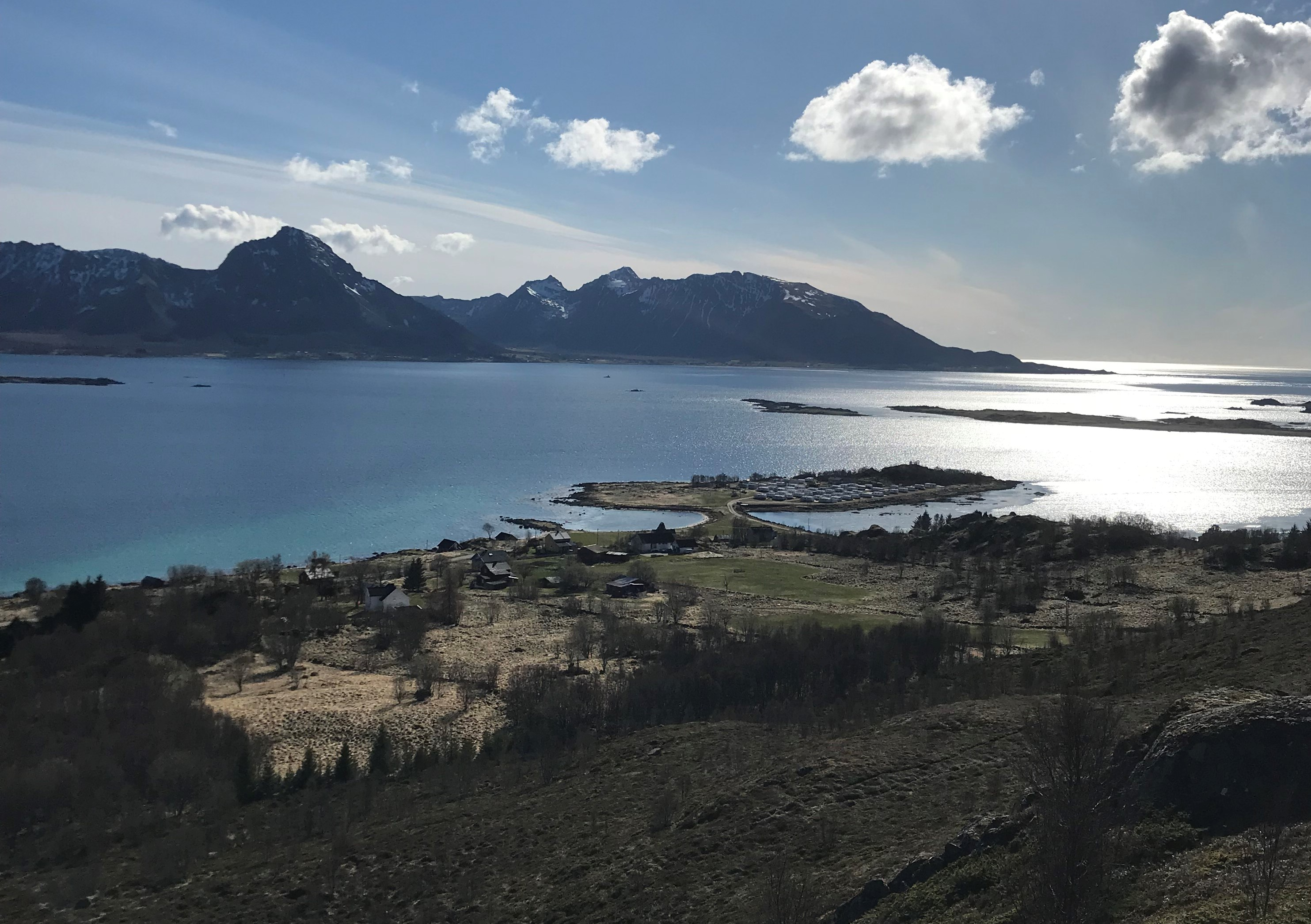 KallsnesSettFraKallsnesAasen